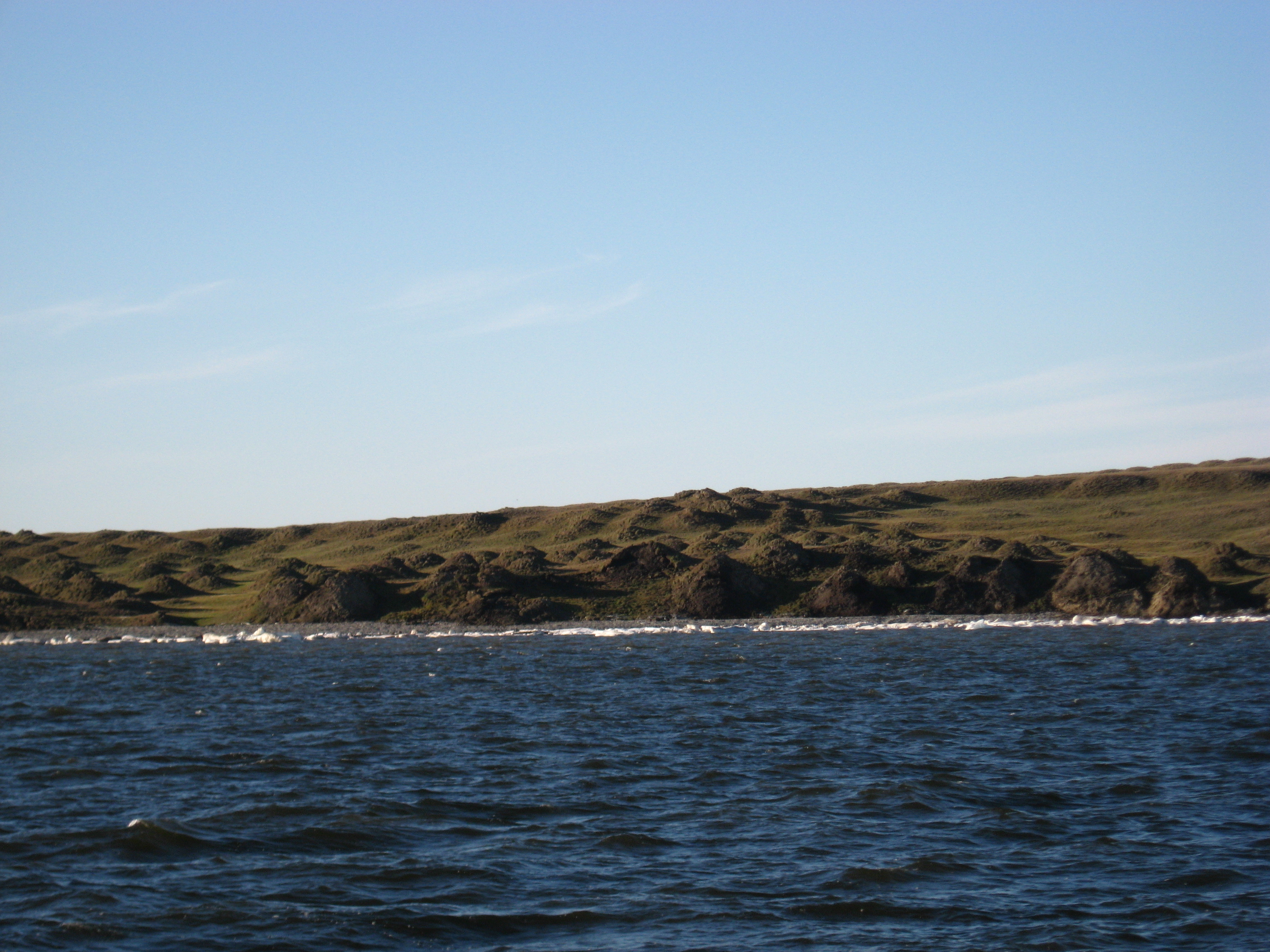 Анабарский район, Якутия. Автор: Vladislav Kyamyarya.